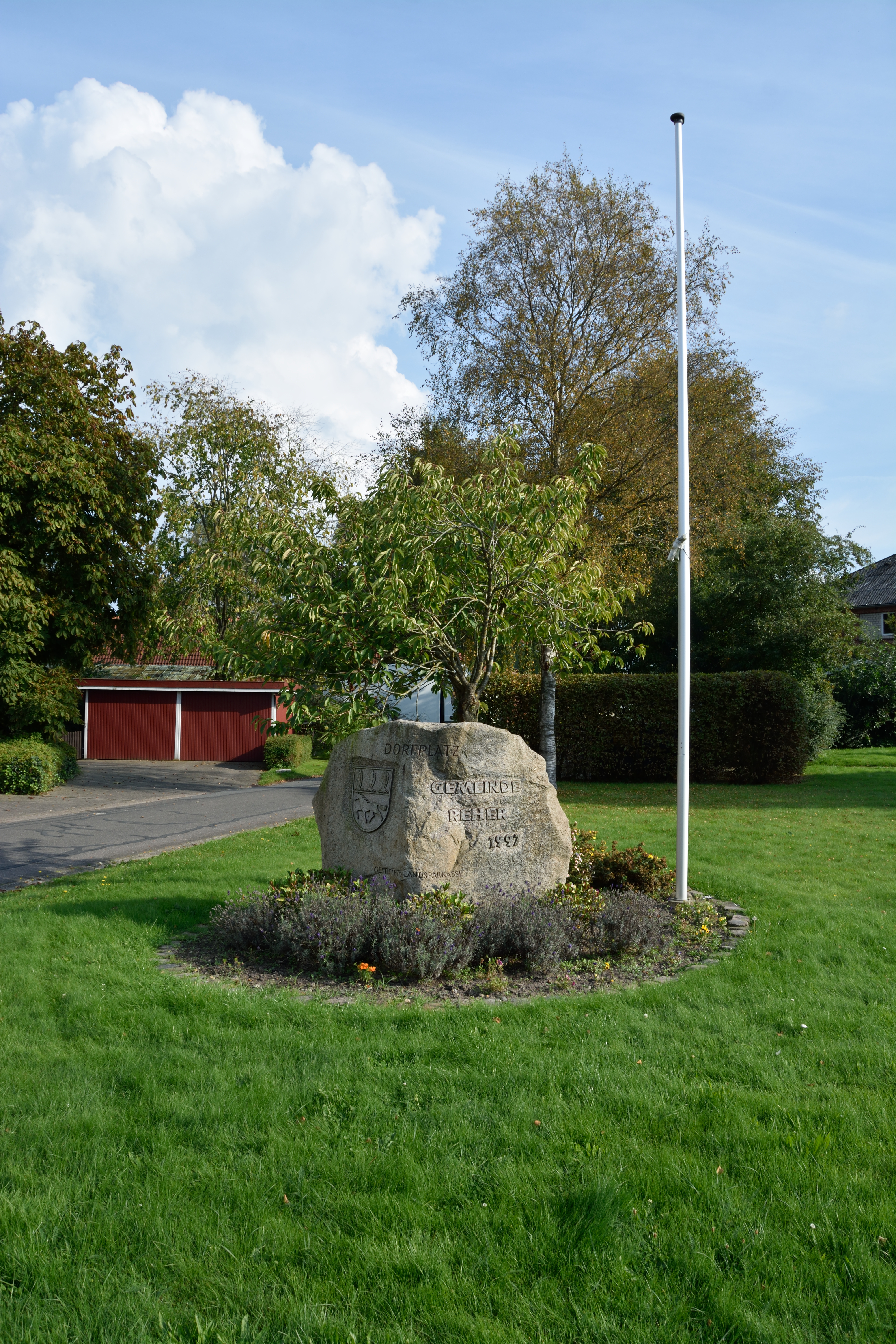 Schleswig-Holstein, Reher, Dorfplatz